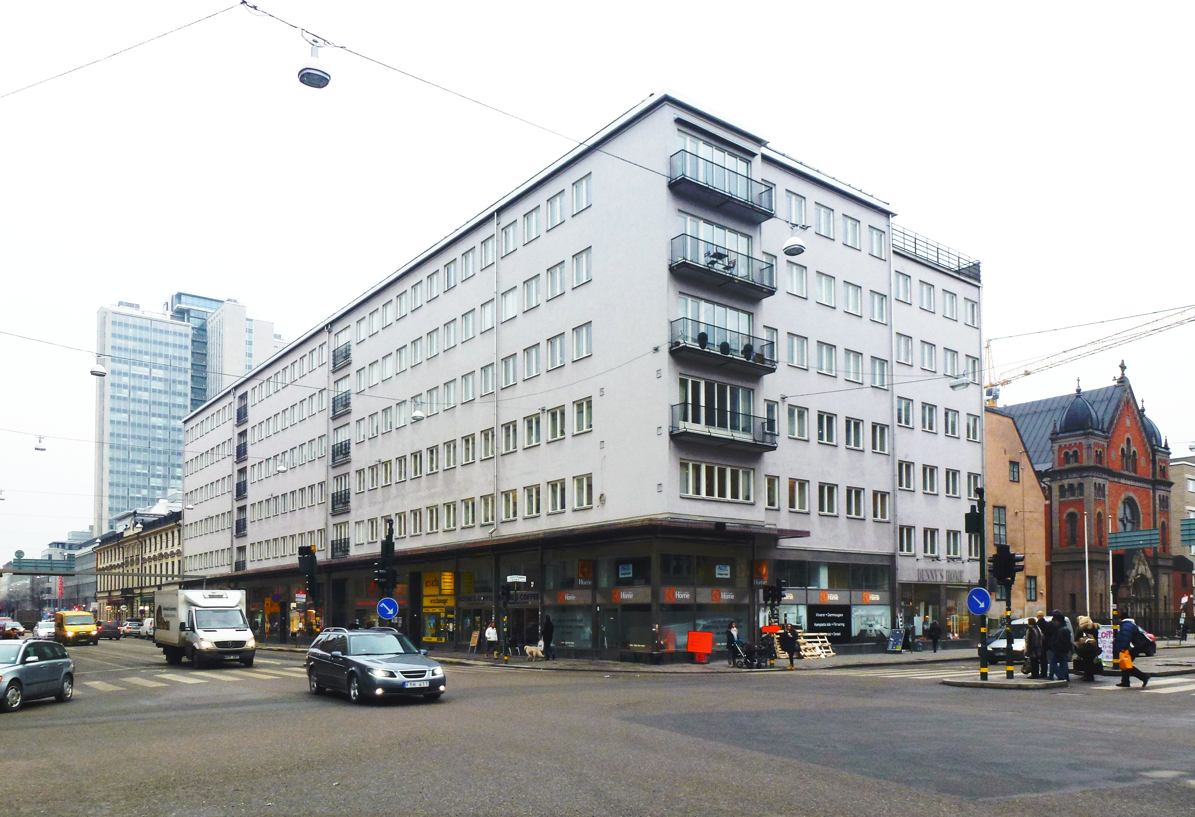 Fastigheten "Nattugglan 19" Götgatan/Folkungagatan, arkitekt Paul Hedqvist